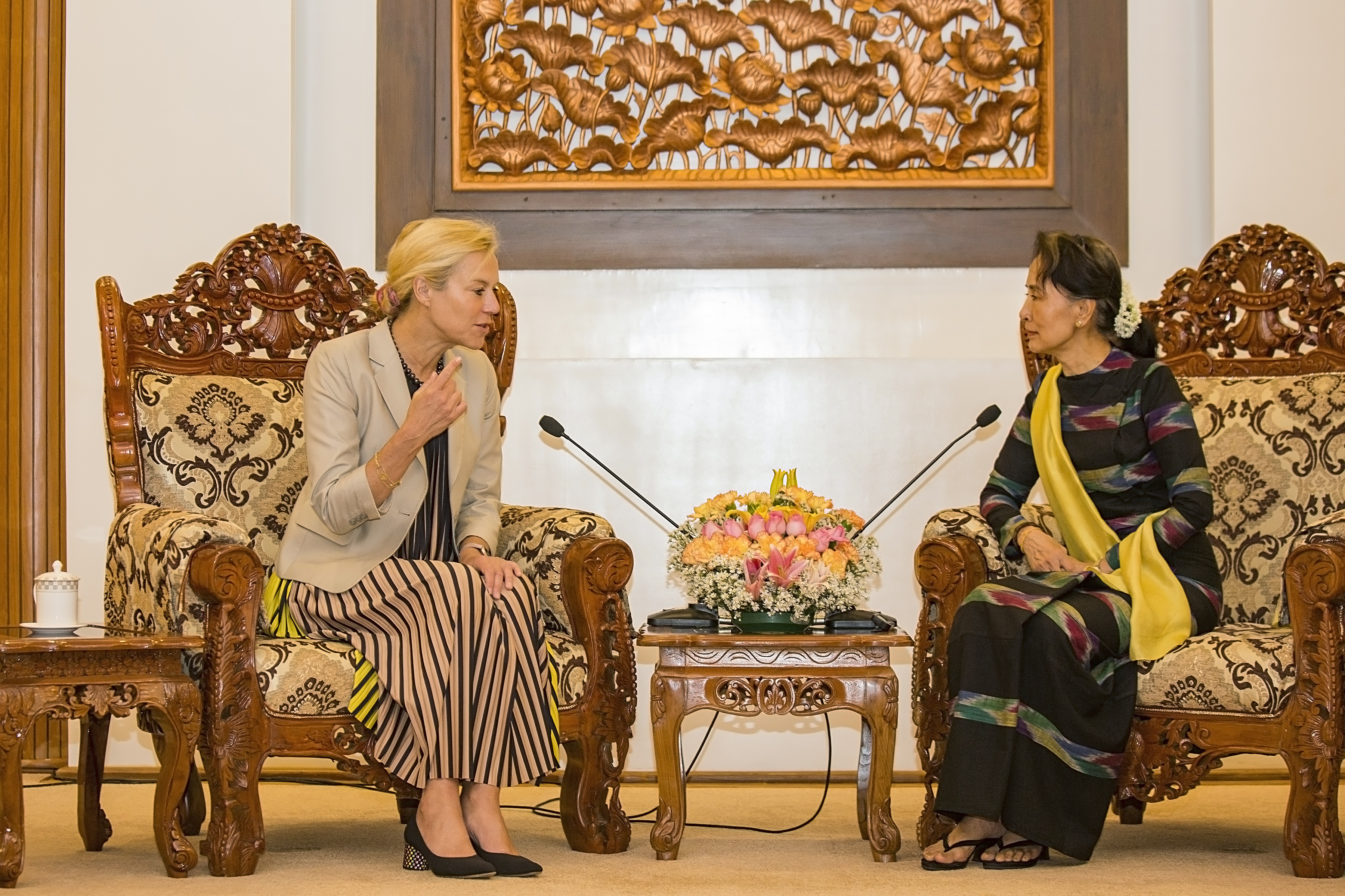 Minister Kaag bezoekt Bangladesh en Myanmar Minister Sigrid Kaag voor Buitenlandse Handel en Ontwikkelingssamenwerking brengt deze week een bezoek aan Bangladesh en Myanmar. Ze wil zich persoonlijk op de hoogte stellen van de vluchtelingencrisis, de manier waarop de autoriteiten hiermee omgaan en de humanitaire hulp die wordt geboden. Vanuit Myanmar zijn sinds augustus vorig jaar honderdduizenden mensen naar Bangladesh gevlucht na gewelddadige onlusten in de provincie Rakhine. De meesten van hen behoren tot de Rohingya, een islamitische minderheid in Myanmar. In een vluchtelingenkamp in een regio in Bangladesh waar bijna een miljoen Rohingya’s verblijven, zal de minister spreken met vluchtelingen en hulpverleners. Ook bezoekt ze een locatie waar het Wereldvoedselprogramma van de VN voedsel uitdeelt aan vluchtelingen. Minister Kaag spreekt ook met de autoriteiten van Bangladesh en Myanmar, onder wie de Myanmarese regeringsleider Aung San Suu Kyi. Om een zo goed mogelijk beeld van de situatie te krijgen, ontmoet ze verder politiek analisten, diplomaten van andere landen en vertegenwoordigers van het maatschappelijk middenveld. Bangladesh en Myanmar hebben aangekondigd binnenkort te beginnen met de repatriëring van Rohingya-vluchtelingen. De VN stelt echter dat de voorwaarden voor een veilige, vrijwillige en waardige terugkeer nog niet zijn gewaarborgd. Kaag: ‘Nederland benadrukt steeds dat terugkeer alleen mogelijk is als het vrijwillig gebeurt, duurzaam, veilig en in waardigheid. Ik zal dat deze week benadrukken tijdens alle ontmoetingen.’ In Bangladesh zal de minister ook een textielfabriek bezoeken en aandacht vragen voor verbetering van de werkomstandigheden in de textielsector. Kaag dringt aan op blijvende steun aan uitvoering van het zogeheten Bangladesh Akkoord, dat voorziet in onder meer internationale inspecties.